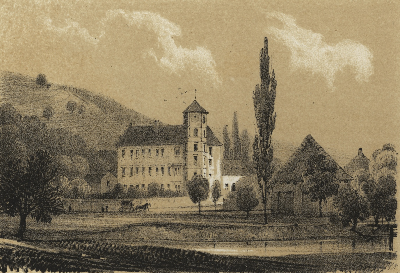 Radim